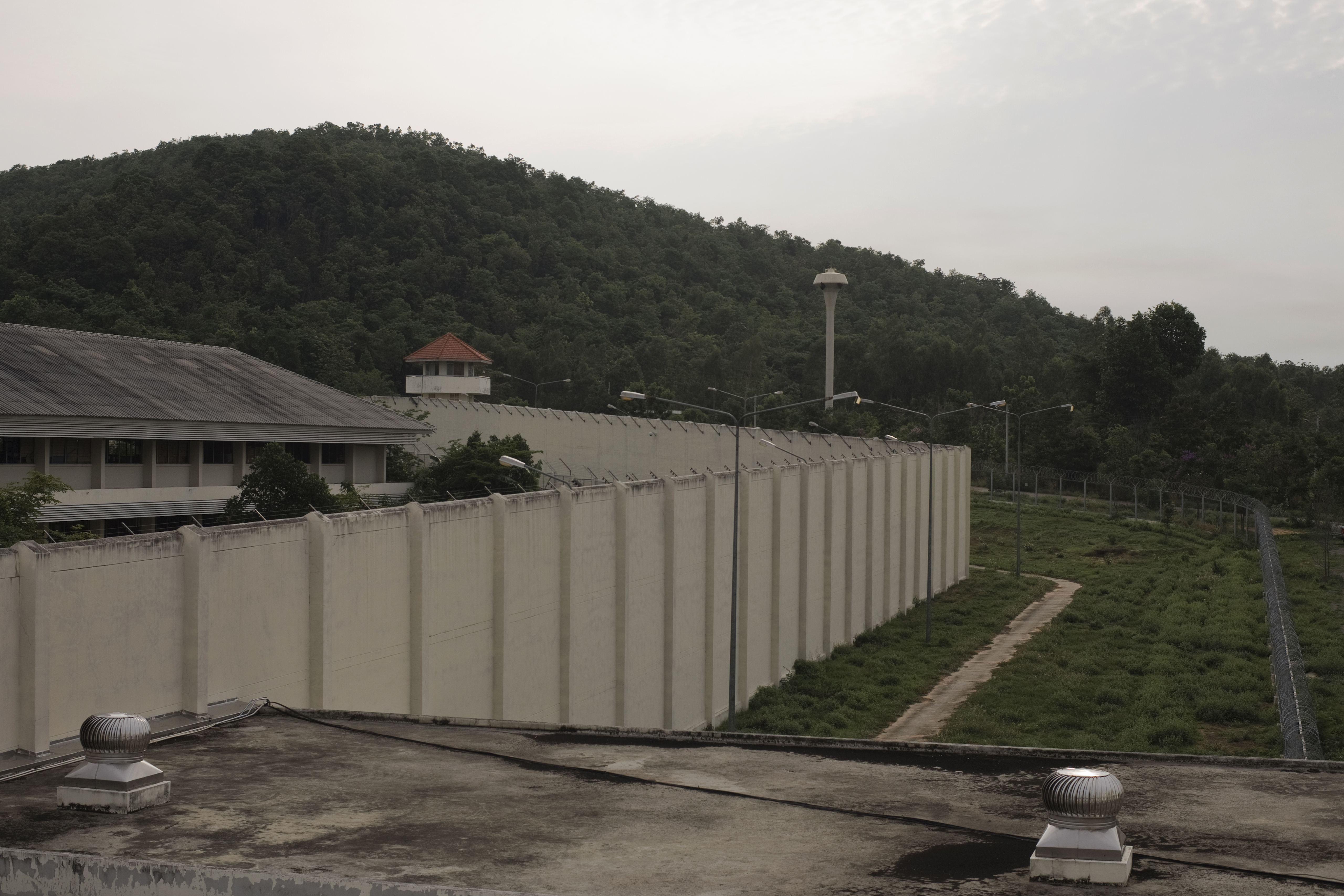 นายกรัฐมนตรี ตรวจเยี่ยมราชการ ณ เรือนจำกลางเขาบิน จังหวัดราชบุรี วันอาทิตย์ ที่ 24 เมษายน พ.ศ.2554 (Photographer attached to the Prime Minister of the Kingdom of Thailand (H.E.Mr.Abhisit Vejjajiva) : Peerapat Wimolrungkarat / พีรพัฒน์ วิมลรังครัตน์) @is50mm